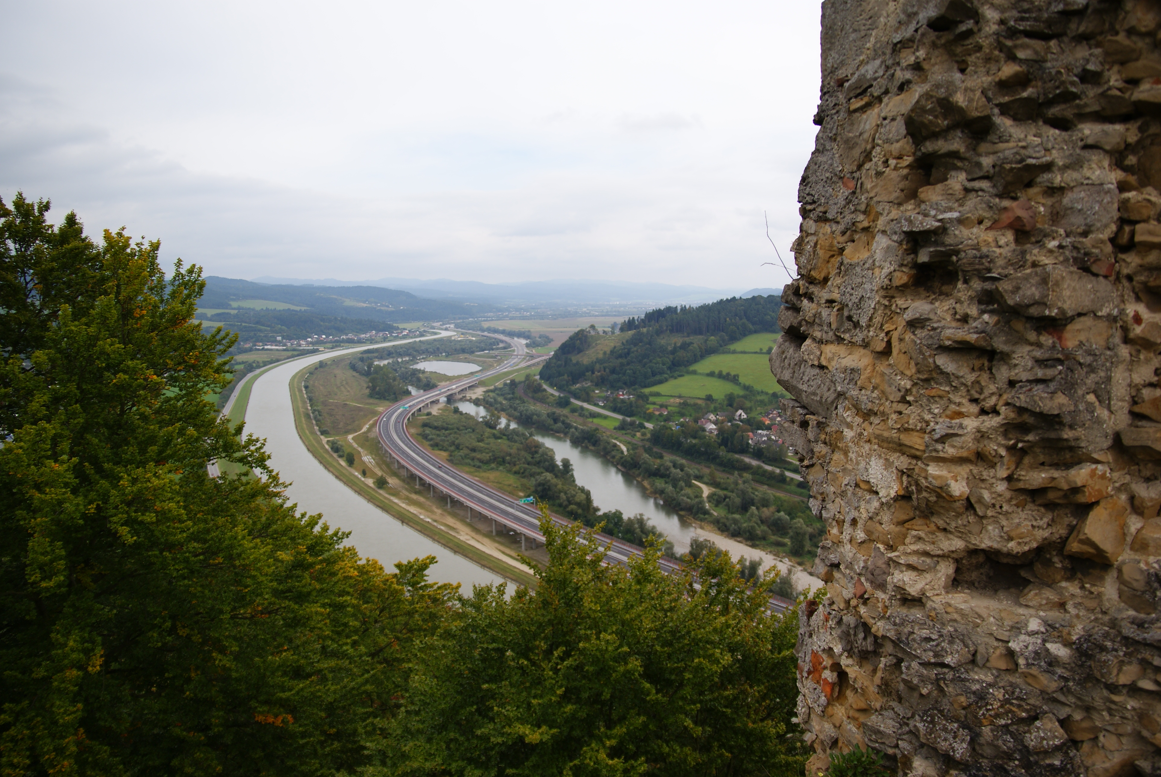 Pohľad z Považského hradu na diaľnicu D1 a rieku Váh